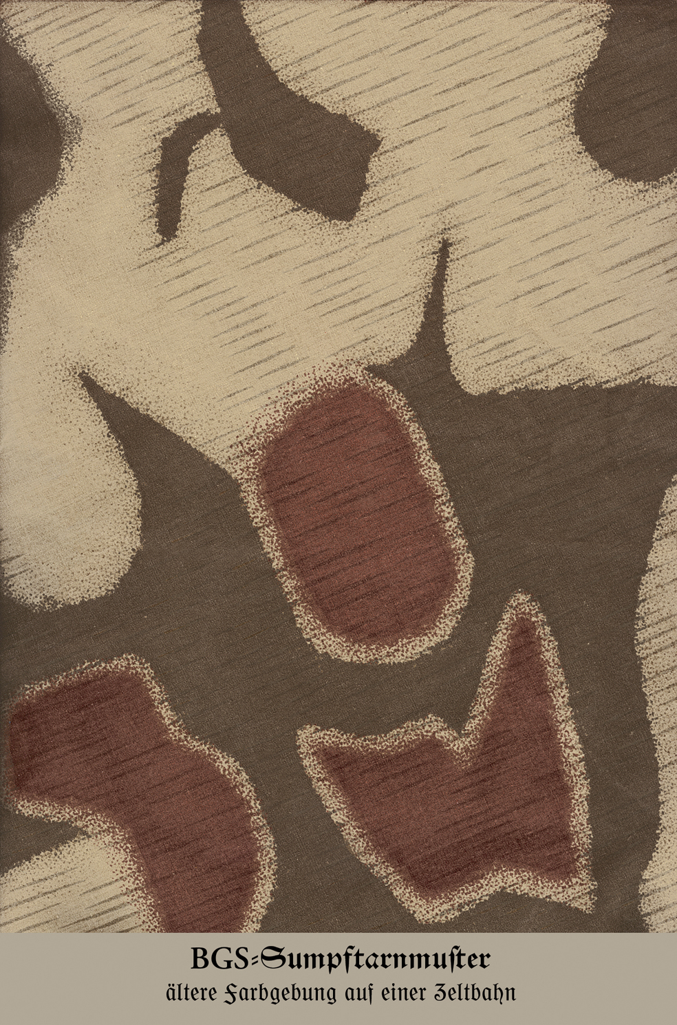 BGS-Sumpftarnmuster, ältere Farbgebung